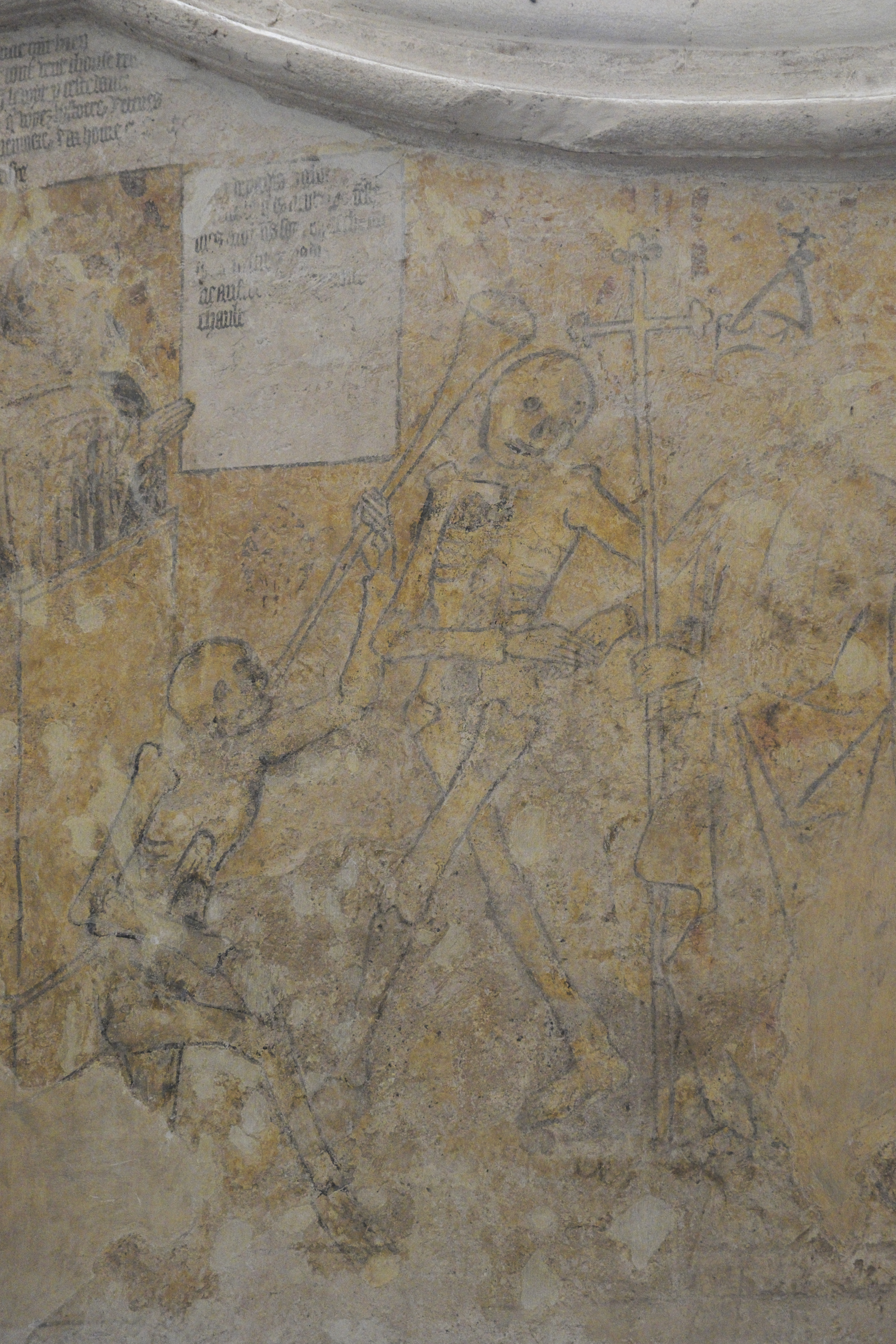 Katholische Kirche Notre-Dame in Kernascléden im Département Morbihan (Region Bretagne/Frankreich), Totentanz, um 1440